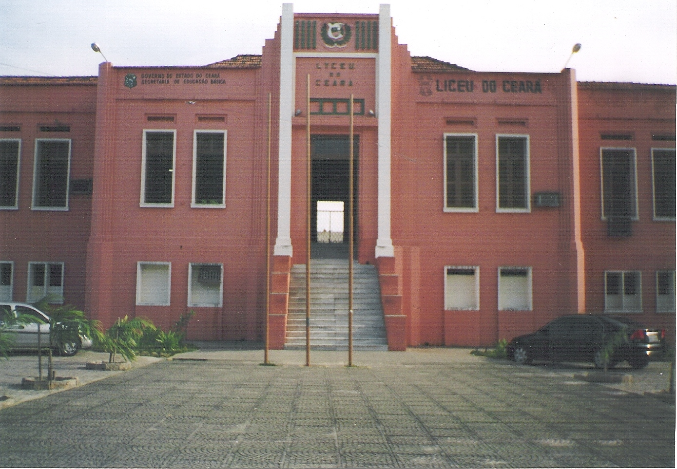 O Colégio Estadual Liceu do Ceará, a primera escola do estado do Ceará, costruido e fundado em 1844, quanda o Ceará ainda era província, e o Brasil era Império; visão atual da escola.